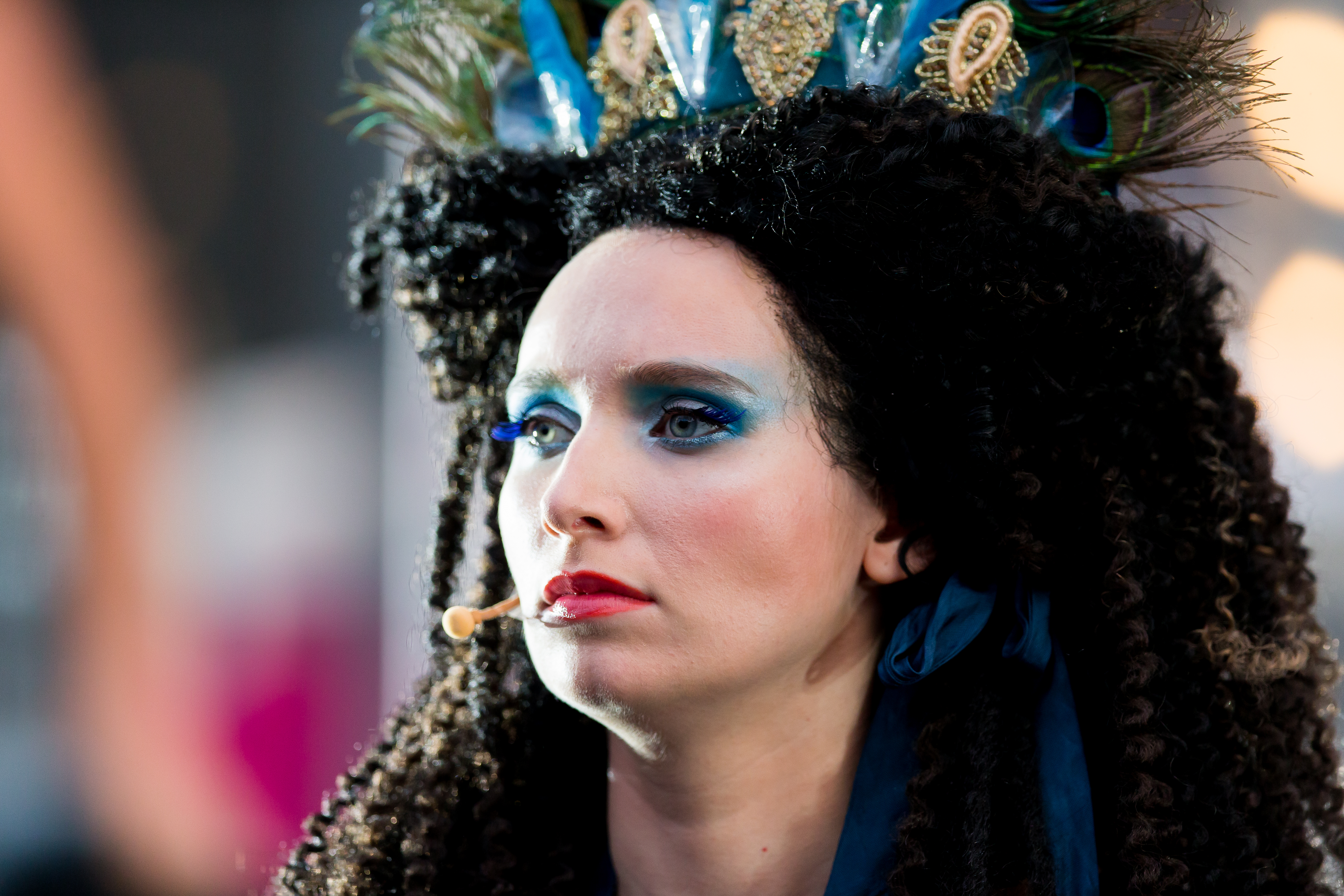 2016: Uraufführung: "GOLD. Der Film der Nibelungen" Regie: Nuran David Calis Autor: Albert Ostermaier Intendant: Nico Hofmann --- Ensemble: Produzent Konstantin Trauer: Uwe Ochsenknecht Regisseur Arsenij Kubik: Vladimir Burlakov Drehbuchautor Charlie P. Weide: Josef Ostendorf Society Reporter Peter Scheumer: Dominic Raacke Kamerafrau "the eye": Anna Rot Setdesignerin "set": Joy Maria Bai Assistentin des Produzenten Carmen: Alexandra Kamp Maskenbildnerin Sueyla Blume : Ayse Bosse die Ältere Kriemhild Karina Bergmann: Katja Weitzenböck die Jüngere Kriemhild Simone Gehel: Constanze Wächter die Ältere Brünhild Lotte Jünger: Michaela Steiger die Jüngere Brünhild Nathalie Aurun: Dennenesch Zoudé Siegfried Mohamad Söder: Ismail Deniz Hagen René Inner: Sascha Göpel Gunther Klaus Castel: Maximilian Laprell Bürgermeister Franz Koppoler: Heiner Lauterbach during Nibelungenfestspiele "GOLD. Der Film der Nibelungen" at Wormser Kaiserdom, Worms, Rheinland Pfalz, Germany on 2016-07-12, Photo: Sven Mandel